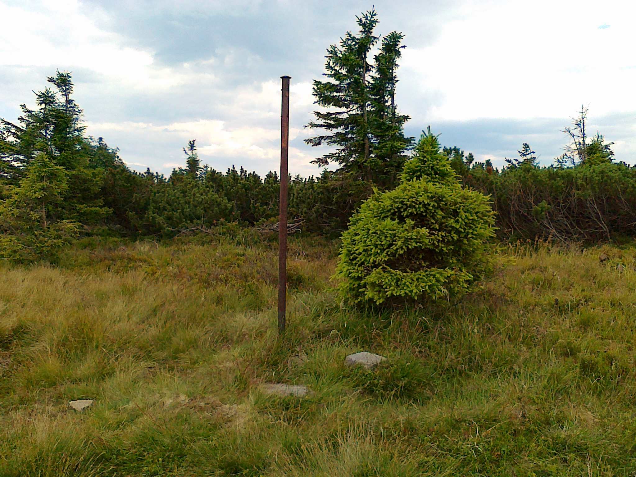 Punkt geodezyjny na szczycie góry Šerák - 1350 m n.p.m.